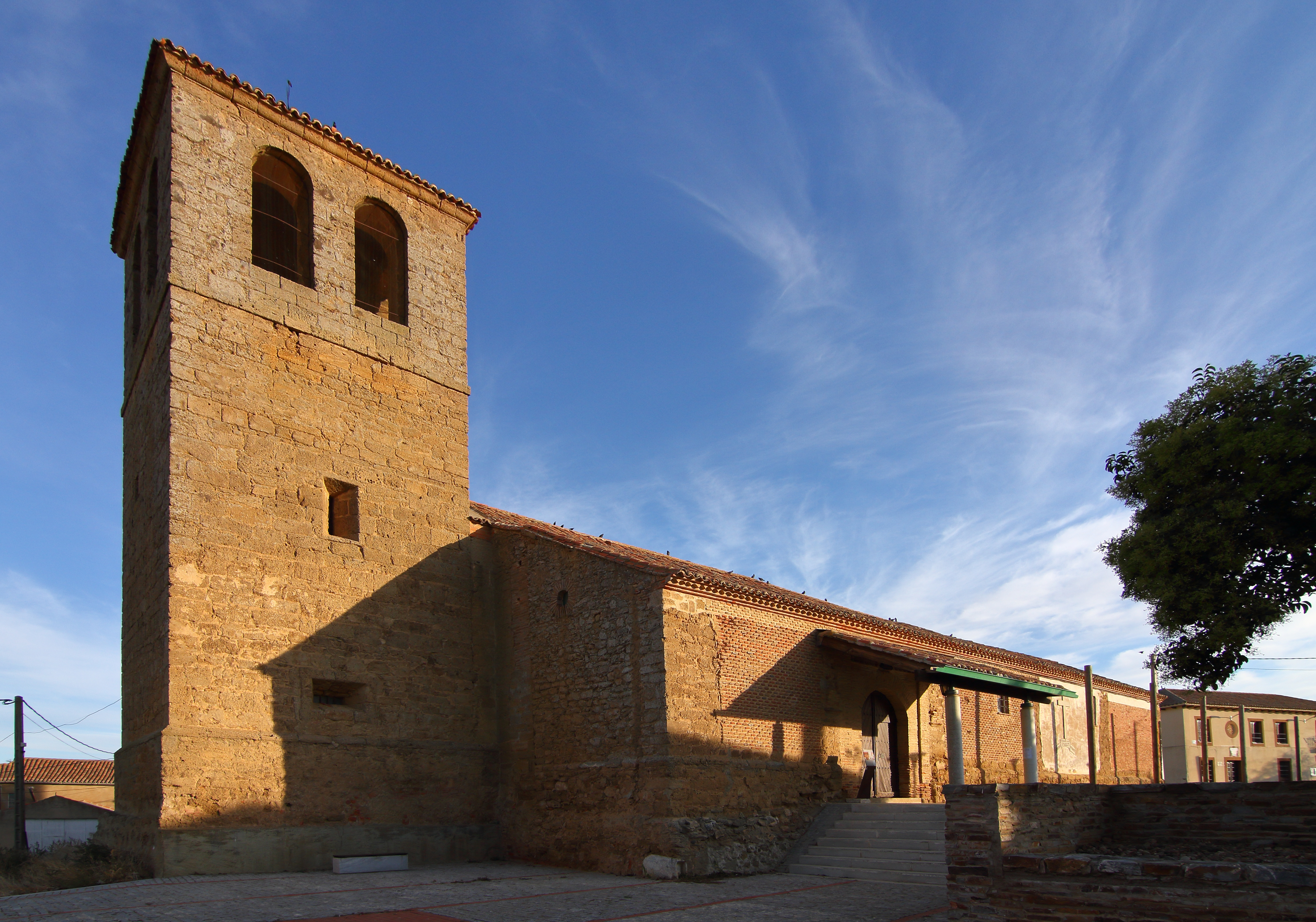 Vidayanes, Iglesia de San Juan Bautista, fachada principal, sur